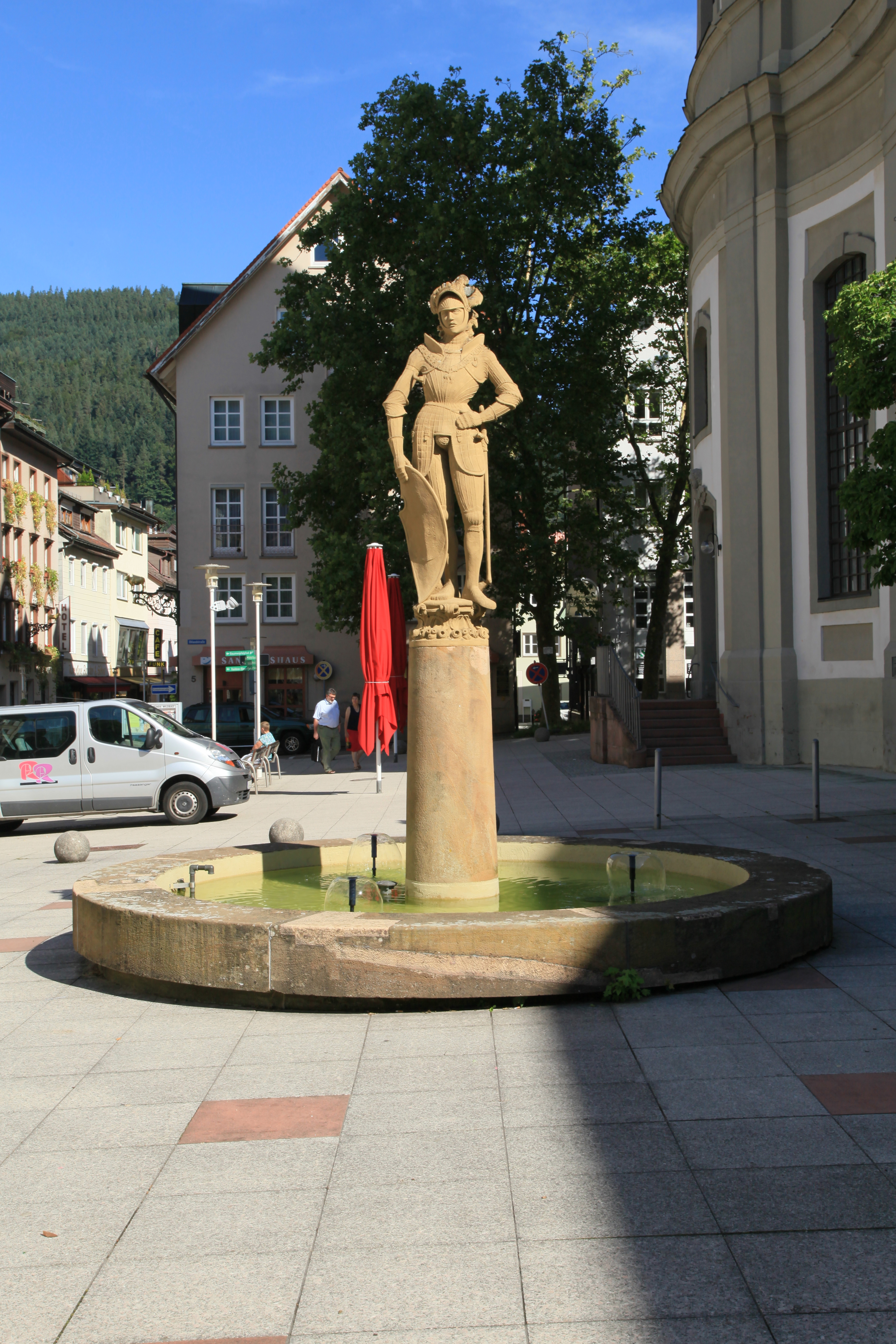 Ferdinandbrunnen, Kurplatz in Bad Wildbad